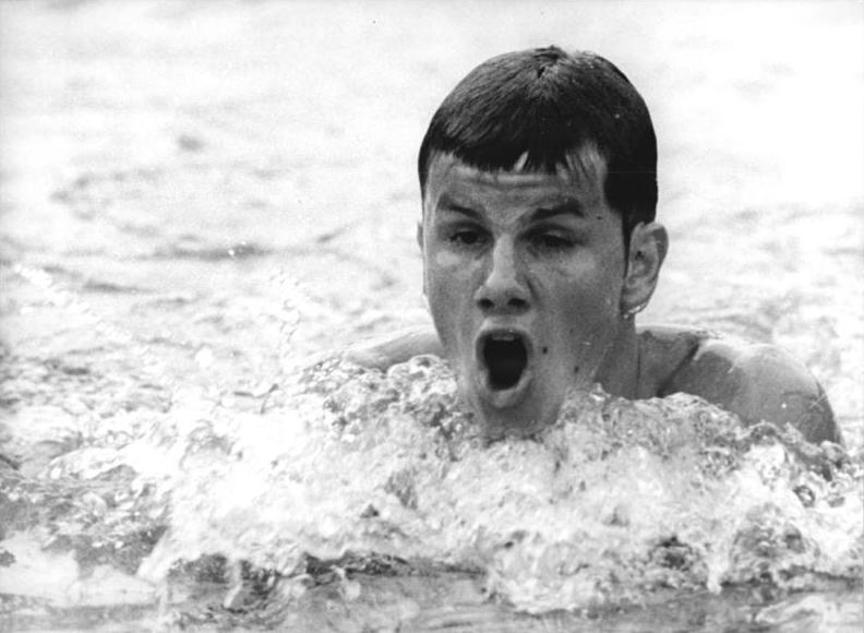 Wolfram Sperling ADN-ZB Gahlbeck 9-7-72-Leipzig:DDR-Meisterschaften im Sportschwimmen vom 8. bis 12.7.72 (1.Tag)-Über 400-m-Lagen der Herren erkämpfte sich Wolfram Sperling (SC DHfK Leipzig) in der neuen Jahresweltbestzeit von 4:38,9 min den Titel.